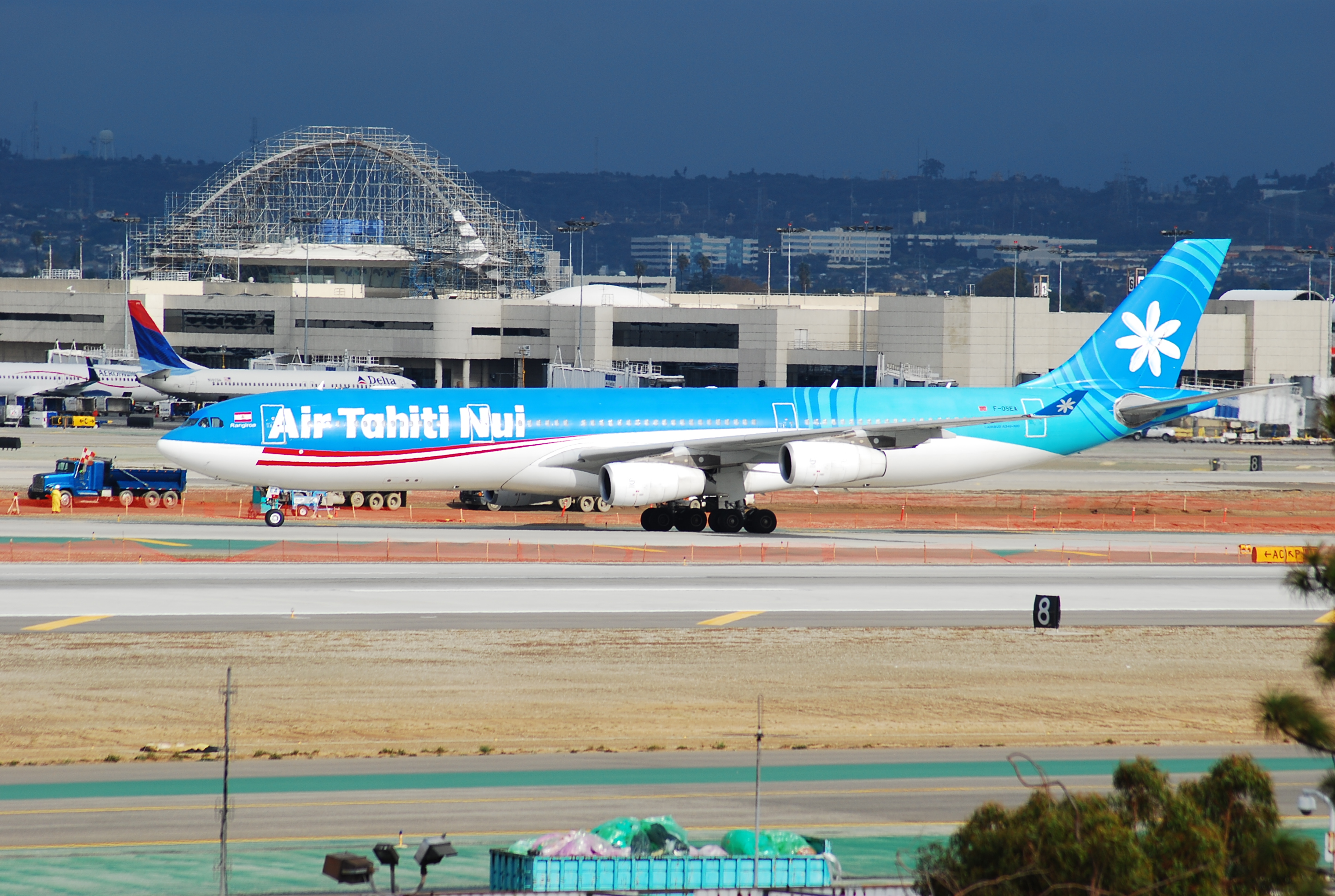 AIR TAHITI NUI A343